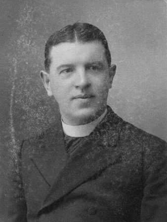 Vladimír Hornof (1870 - 1942), Český římskokatolický kněz a básník.